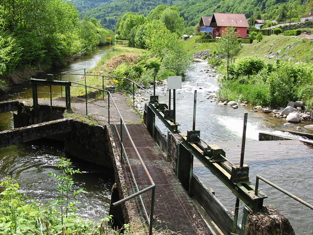 La Moselotte Commune de La Bresse, département des Vosges, France Dérivation au pont du Bas pour alimenter une petite turbine. Photographie personnelle prise le 7 juin 2006. Copyright © Christian Amet